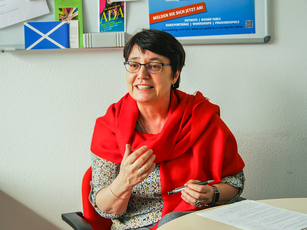 Prof. Dr. Birgitt Riegraf. Foto: Johannes Pauly